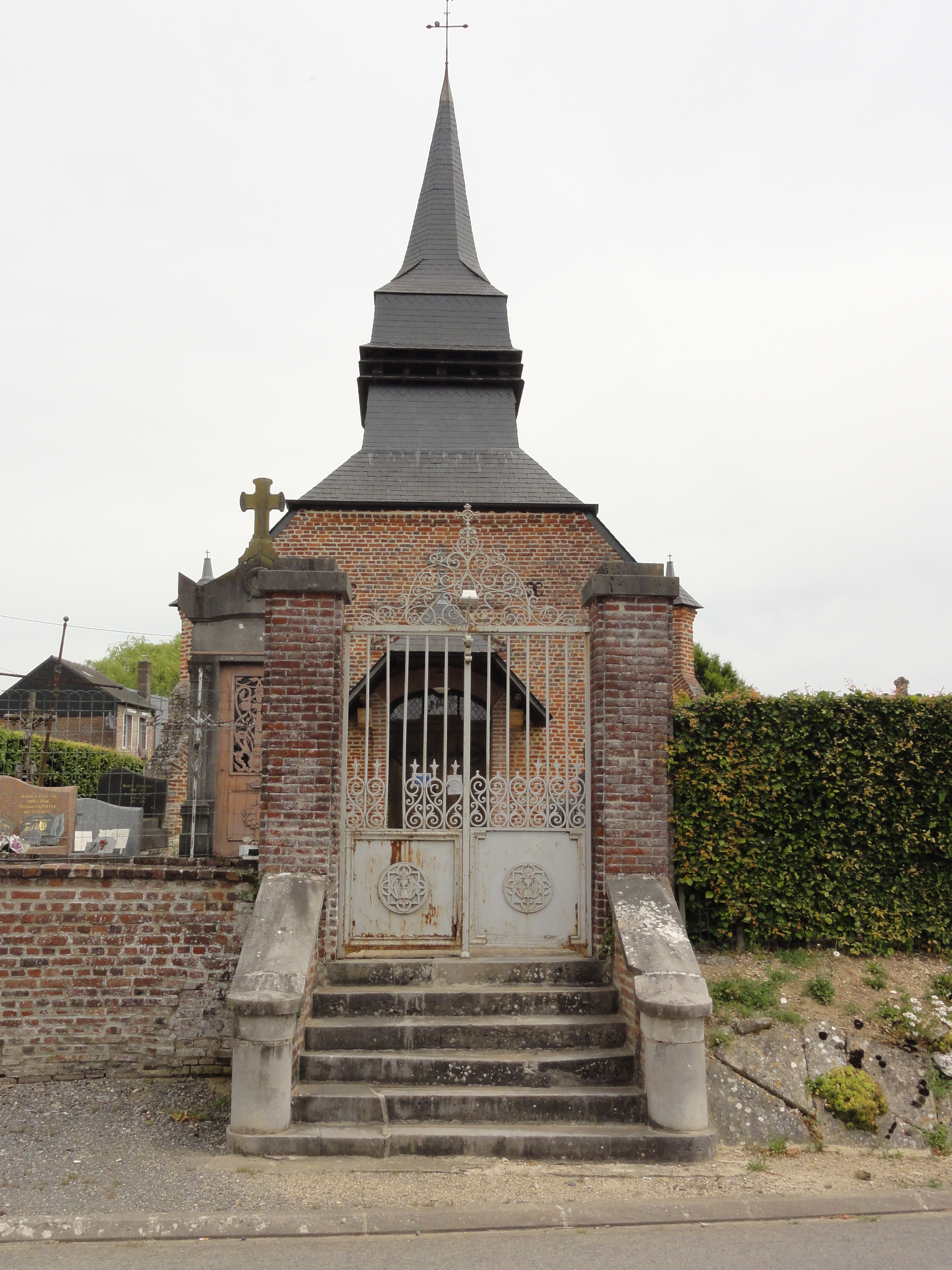 Vincy-Reuil-et-Magny (Aisne) église Saint-Léger de Magny